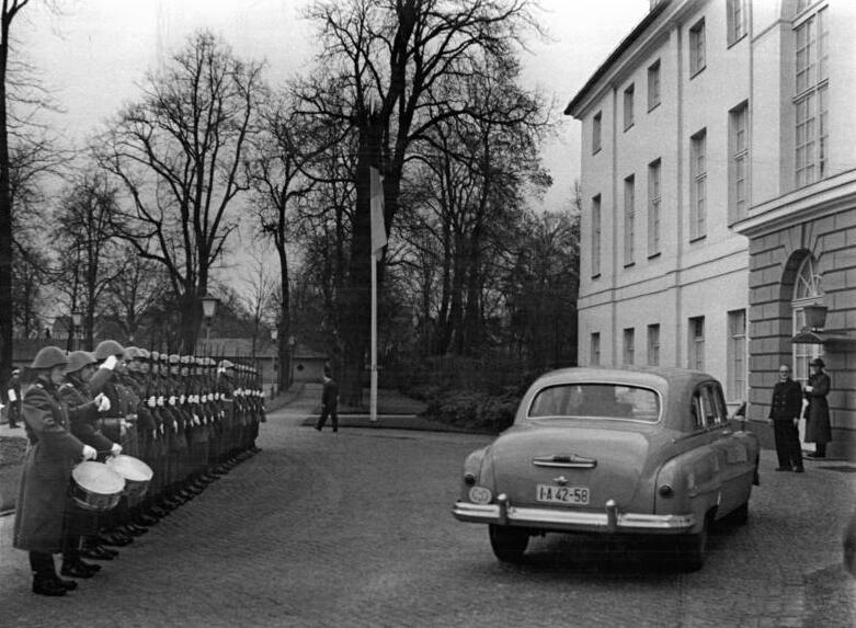 Zentralbild Heilig Que-Qu-Neujahrsempfang bei Präsident Wilhelm Pieck. Am Vormittag des 1.1.1959 überbrachte das Diplomatische Korps des Präsidenten der Deutschen Demokratischen Republik, Wilhelm Pieck, in seinem Amtssitz Schloß Niederschönhausen in traditioneller Weise die Neujahrsglückwünsche.